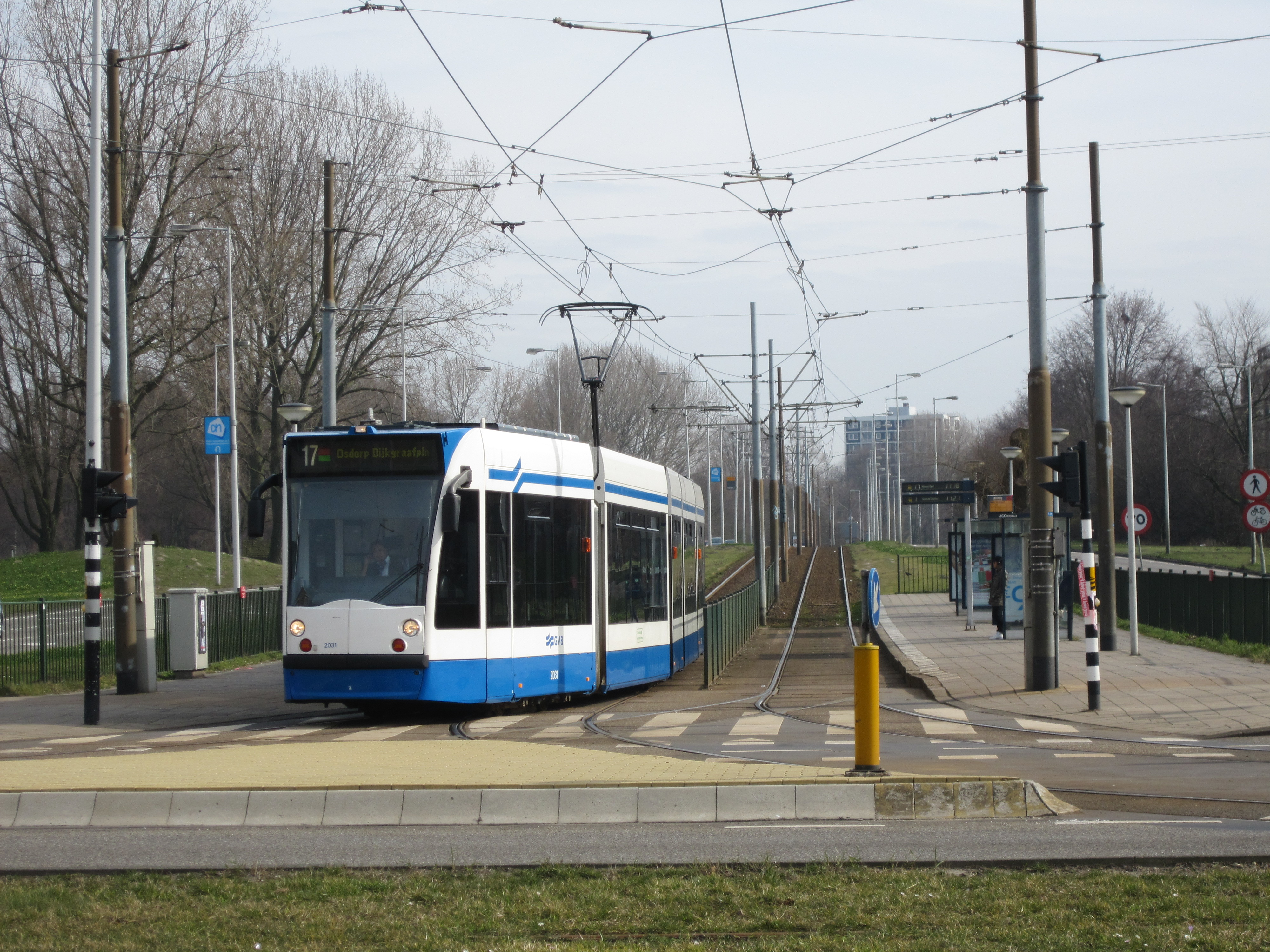 Splitsing van lijn 1 en 17 in Amsterdam Osdorp, halte Meer en Vaart